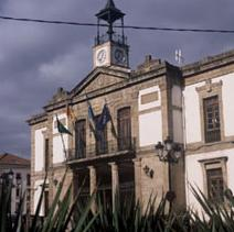 Ayuntamiento del concejo asturiano de Cangas de Onís